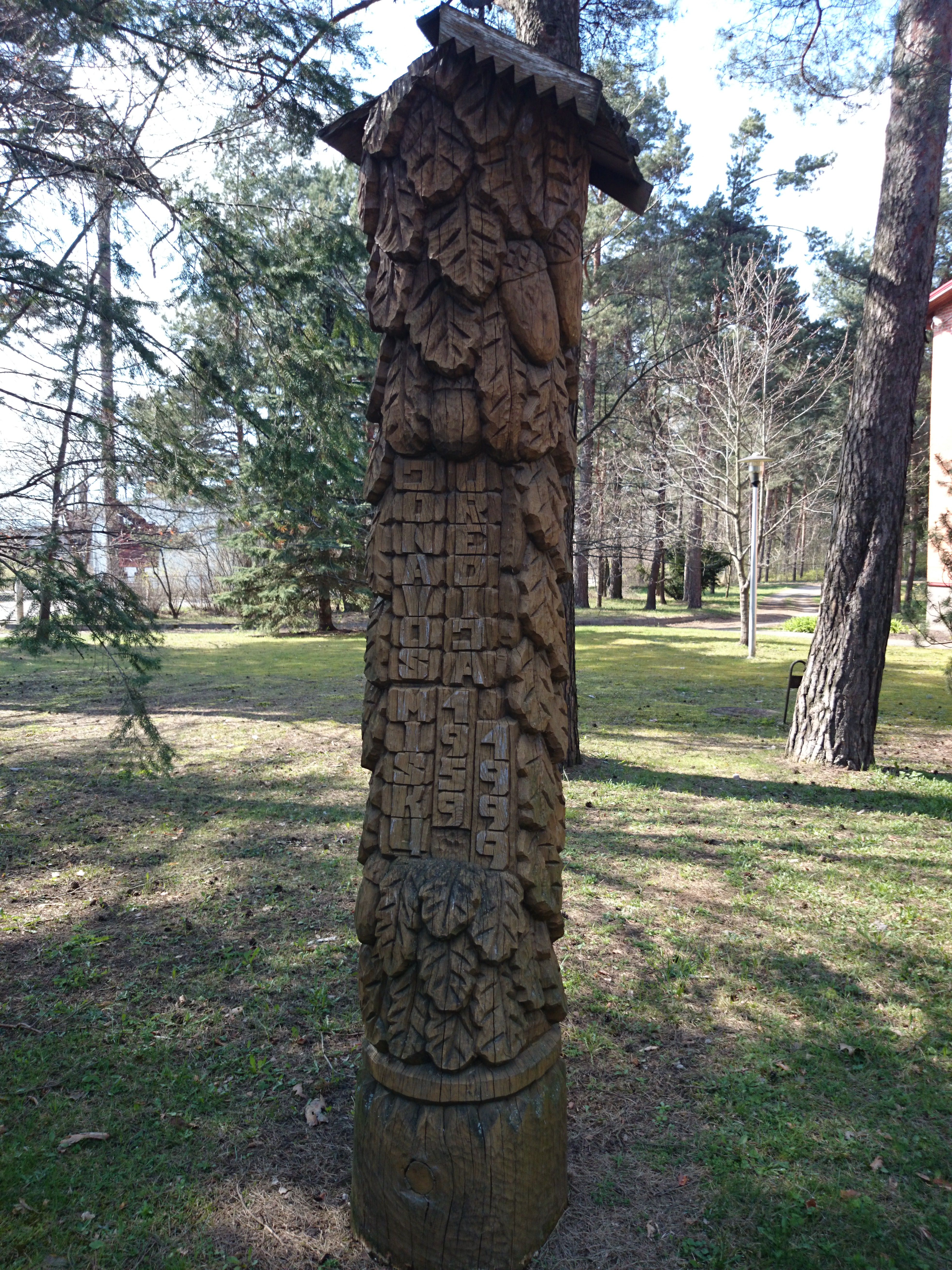 Jonava Forestry